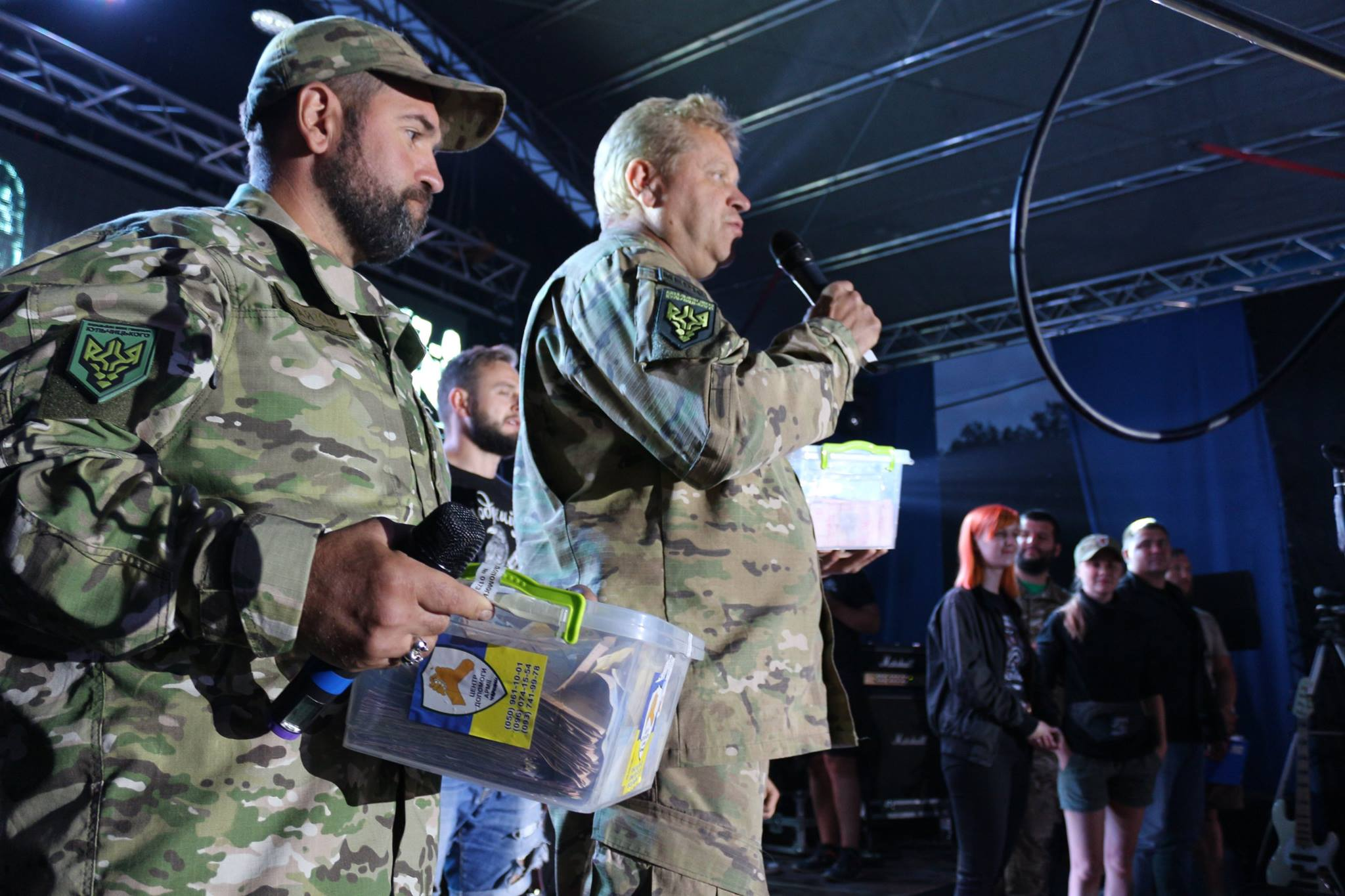 Організатори передали кошти начмеду бат. ім. Кульчицького